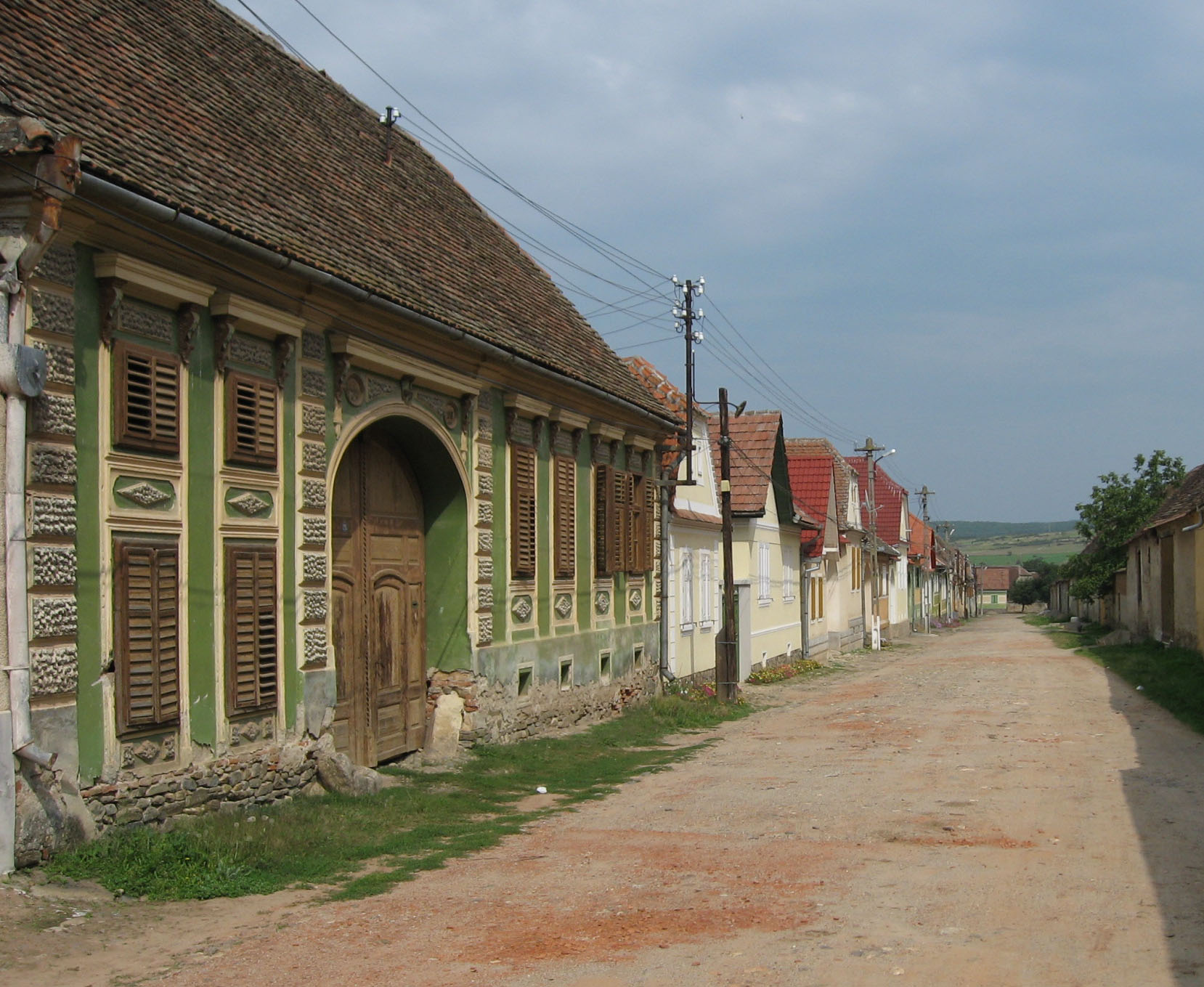 Die Maria-Theresien-Gasse (Hintergåssn) in Großpold, Apoldu de Sus, Rumänien